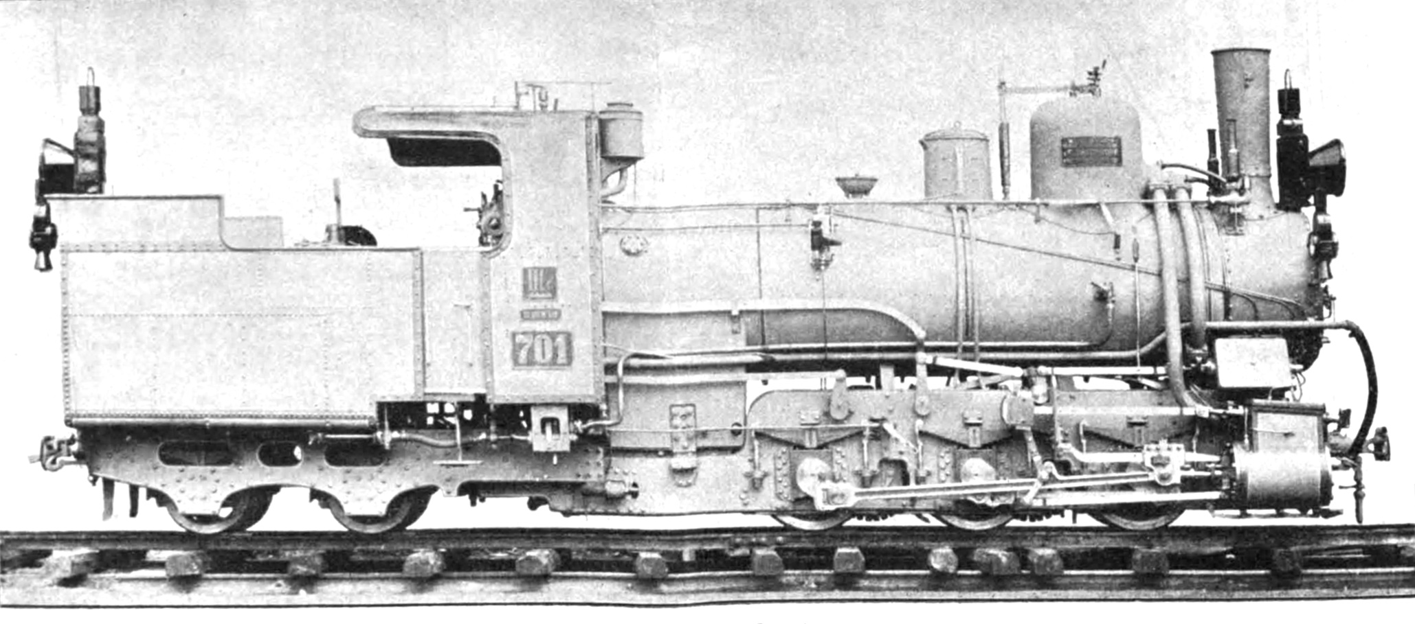 Stütztenderlokomotive Reihe IIIc5 Nr.701 mit Zahnrad- und Adhäsionsantrieb der Bosnisch-Herzegowinischen Staatsbahnen (BHStB), Werkbild